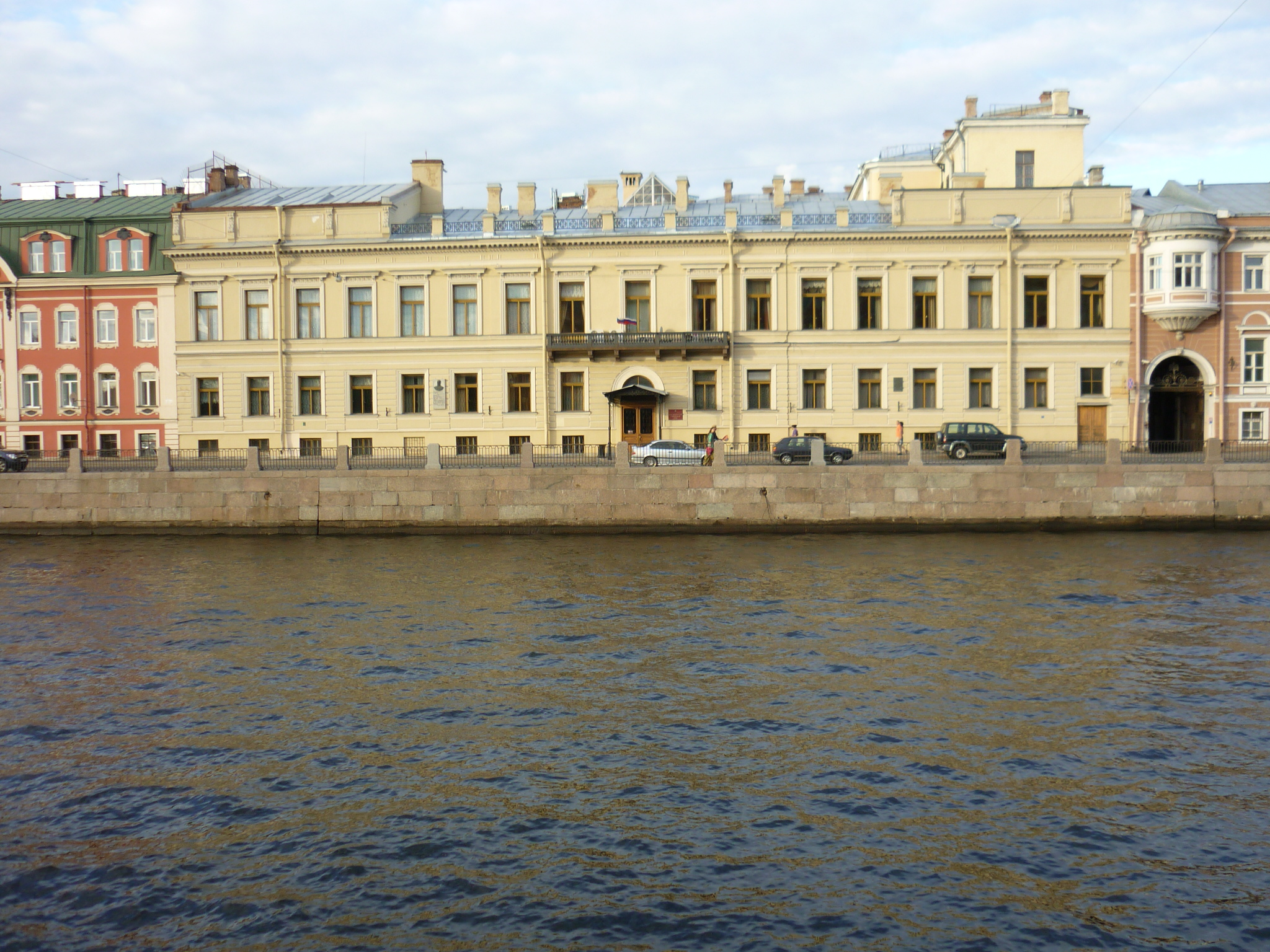 В этом доме с 1838 года помещались штаб корпуса жандармов и, по определению А. И. Герцена, «Главная шпионская контора» - Ш отделение собственной его императорского велячества канцелярии, созданное в 1826 году во главе с А. Х. Бенкендорфом.До того здание сменило немало владельцев. Граф Остерман в конце ХVIII века построил здесь для себя богатый особняк, в 1796 году продал его (эа 100 тысяч рублей) военно-сиротскому дому «для помещения воспитанниц отделения». Когда это отделение закрылось, новым владельцем стал князь А. Я. Лобанов-Ростовский. Он купил этот дом в 1816 году (уже за 225 тысяч рублей!). После того, как О. Монферран построил для князя «дом со львами» (рядом с Исаакиевским собором), Лобанов-Ростовский свой дом на Фонтанке продал графу В. В. Кочубею. А после смерти графа Кочубея правительство купило это здание для Третьего отделения.Здание перестраивалось в 1890-1892 годах и в 1900 г архитектором Марфельдом Р.Р. В настоящее время в доме 16 работает городской суд.